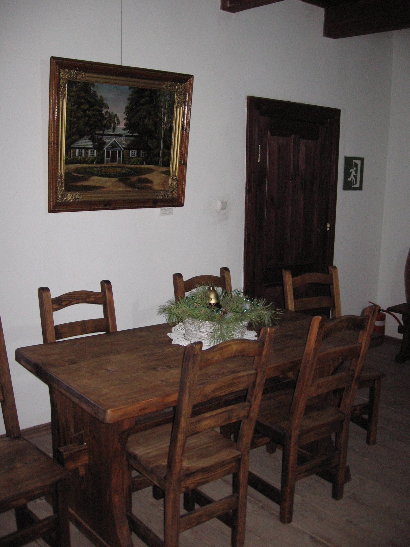 Беларуская (тарашкевіца): Mэмарыяльны музэй-сядзіба Т. Касьцюшкі. Інтэр'ер аднаго з пакояў. This is a photo of Belarusian heritage monument. Reference number: 111Г000305 ( WLM)